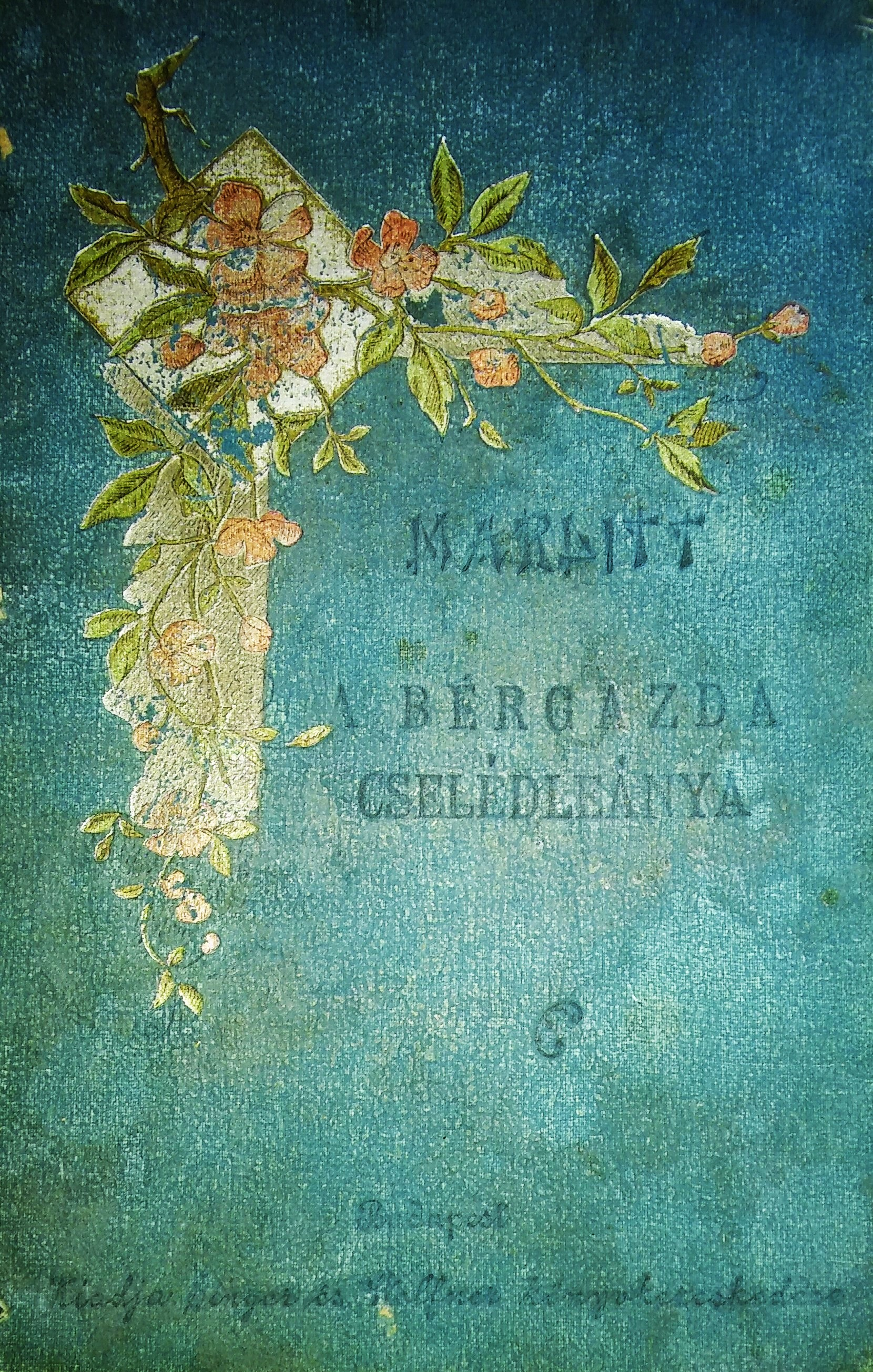 E. Marlitt: A bérgazda cselédleánya, 1900 körül